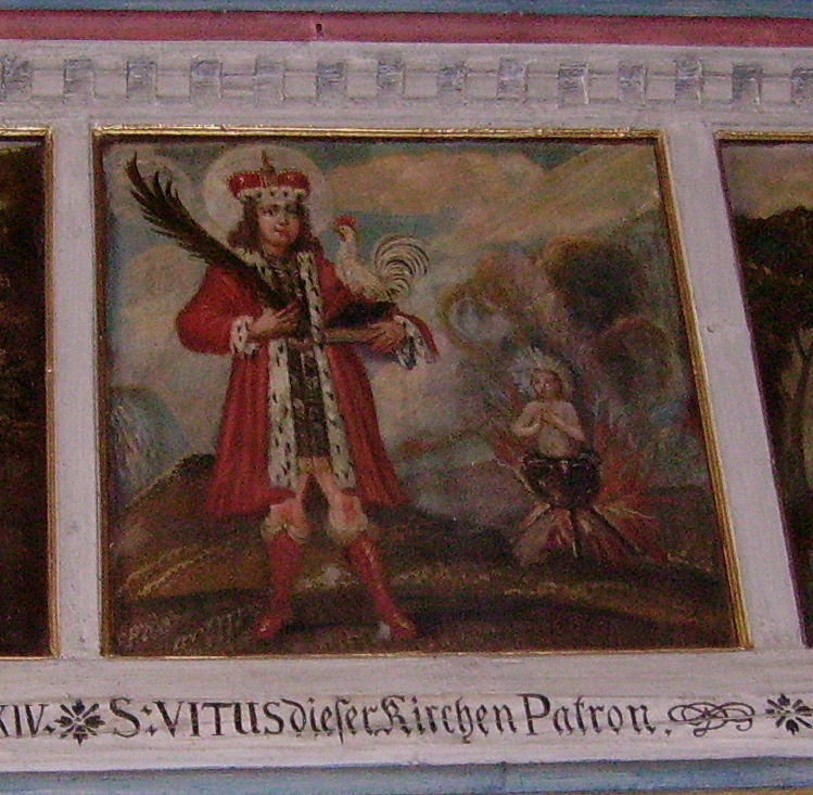 St. Vitus in Heiligenstadt in (Franconia)